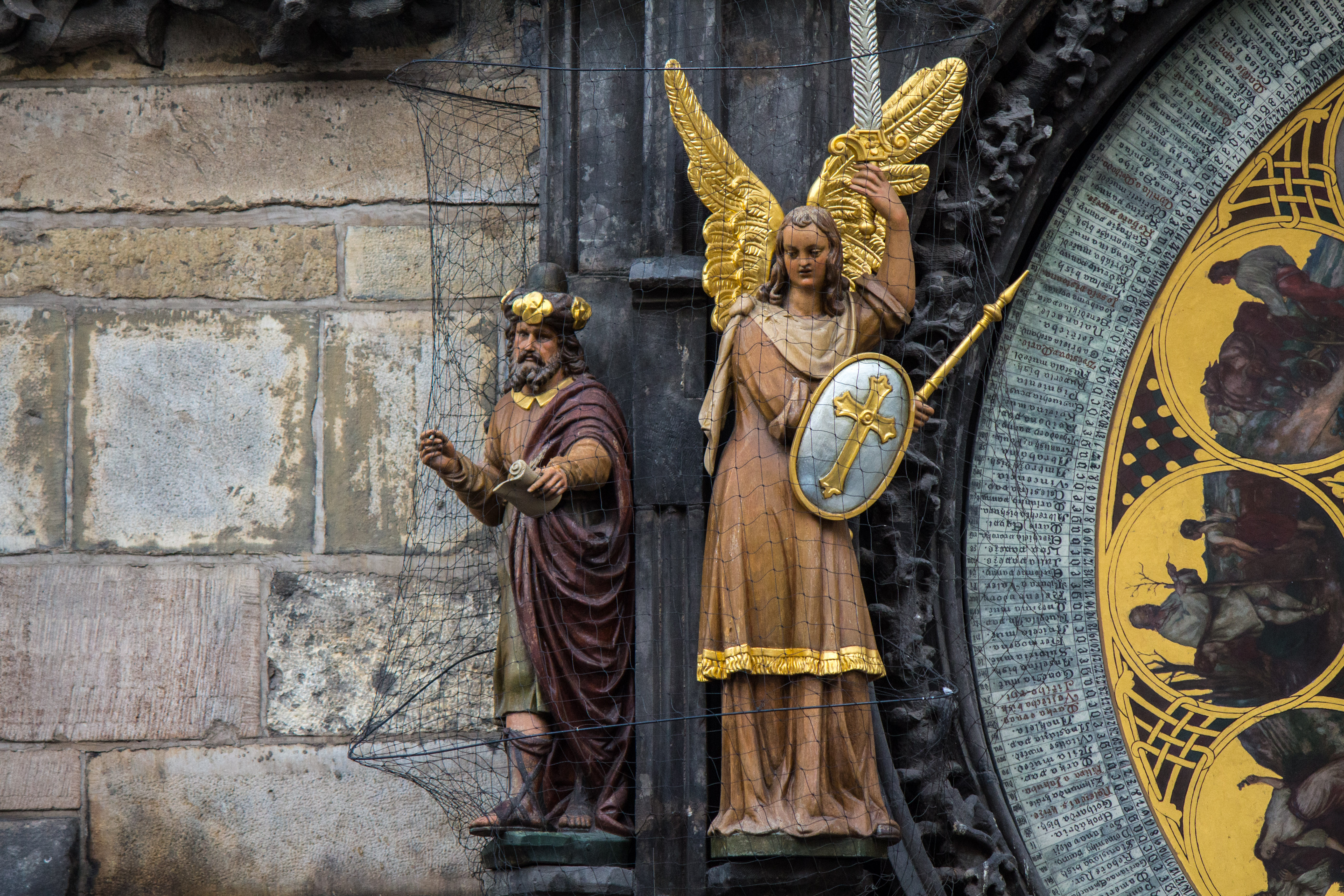 Der Philosoph und der Engel